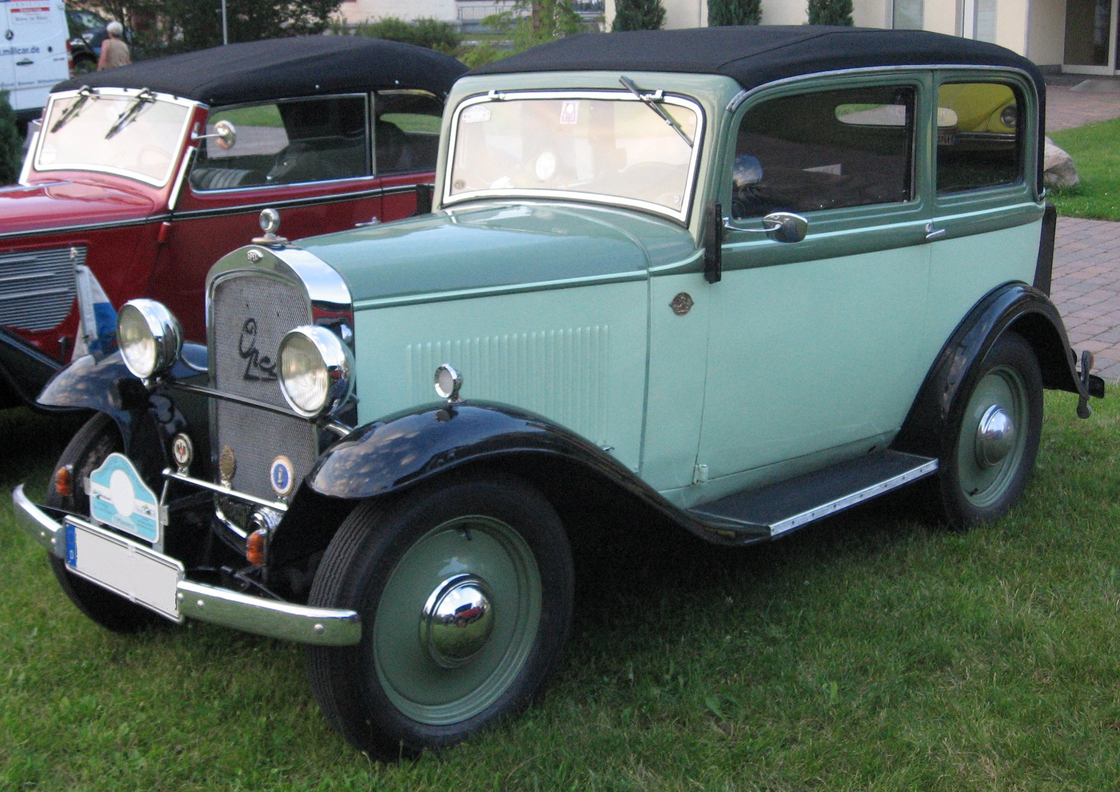 Opel